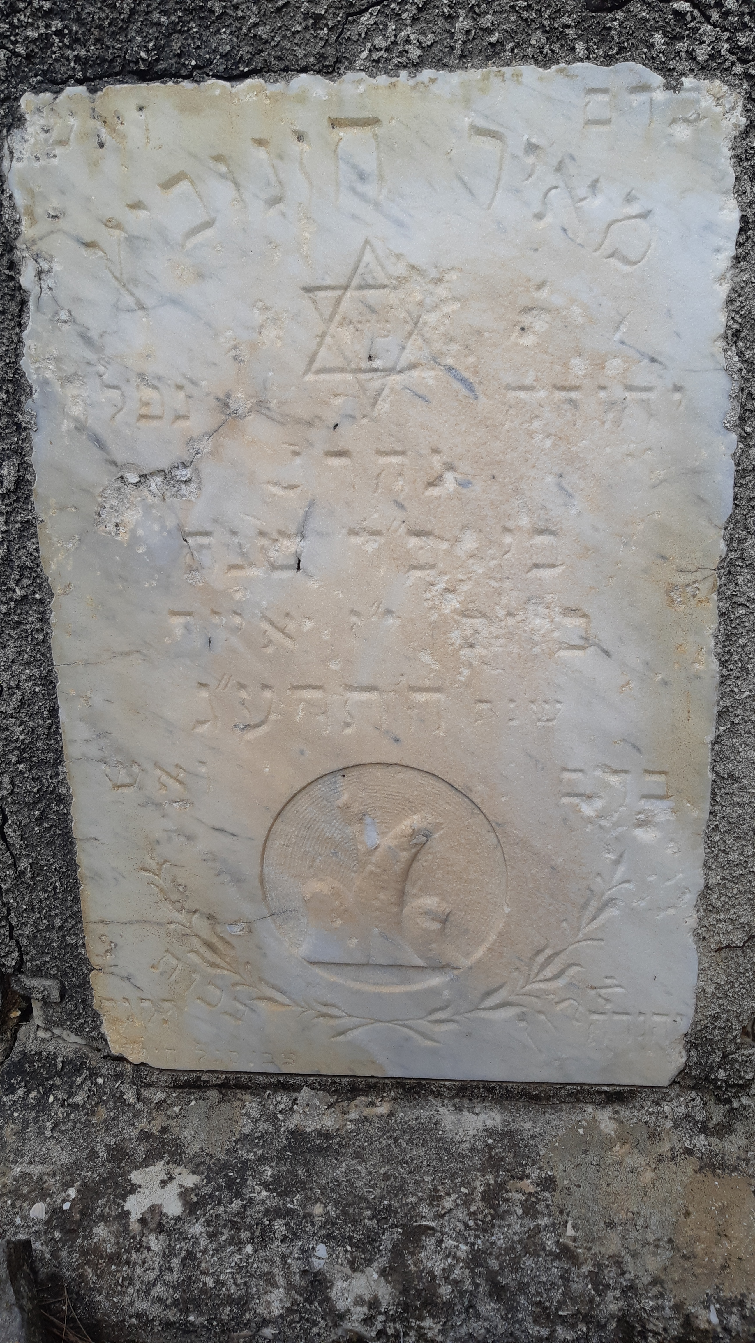 המצבה על קברו של מאיר חזנוביץ במרחביה. החלל הועבר לחלקת השומר בבית הקברות בכפר גלעדי